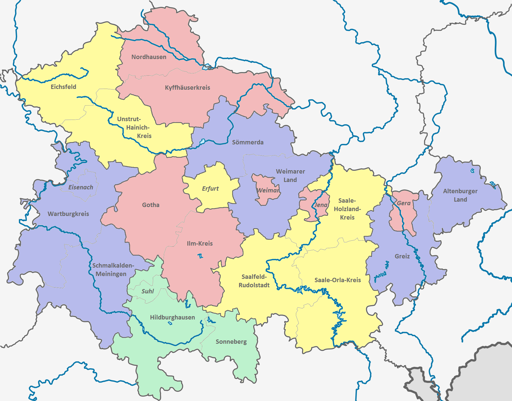 Karte des Vorschlags zu einer Kreisgebietsreform in Thüringen durch das Innenministerium.